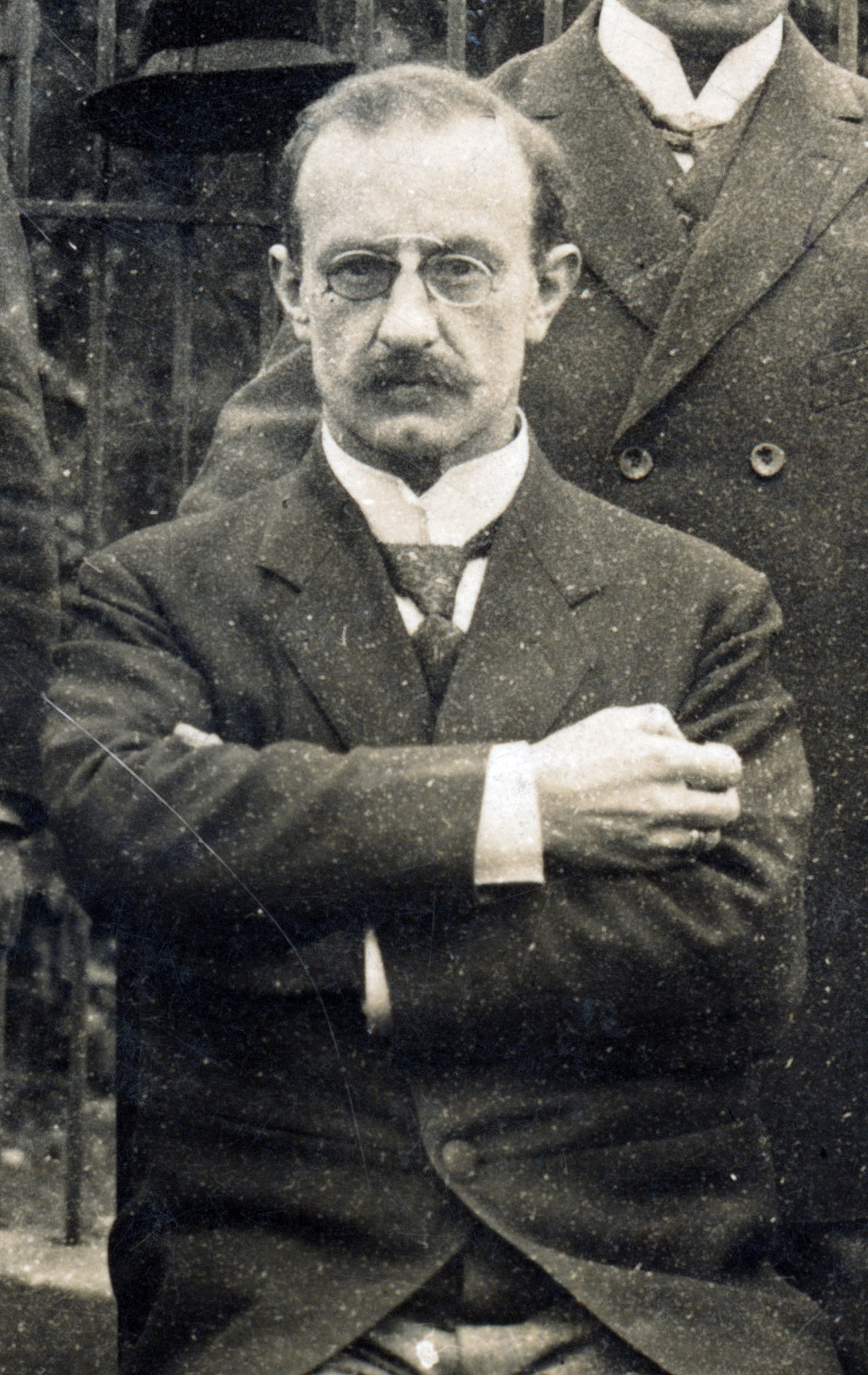 Friedrich Ernst Grünstadt (1874-1943), Heimatgeschichtler, als Grünstadter Schulrektor, 1917